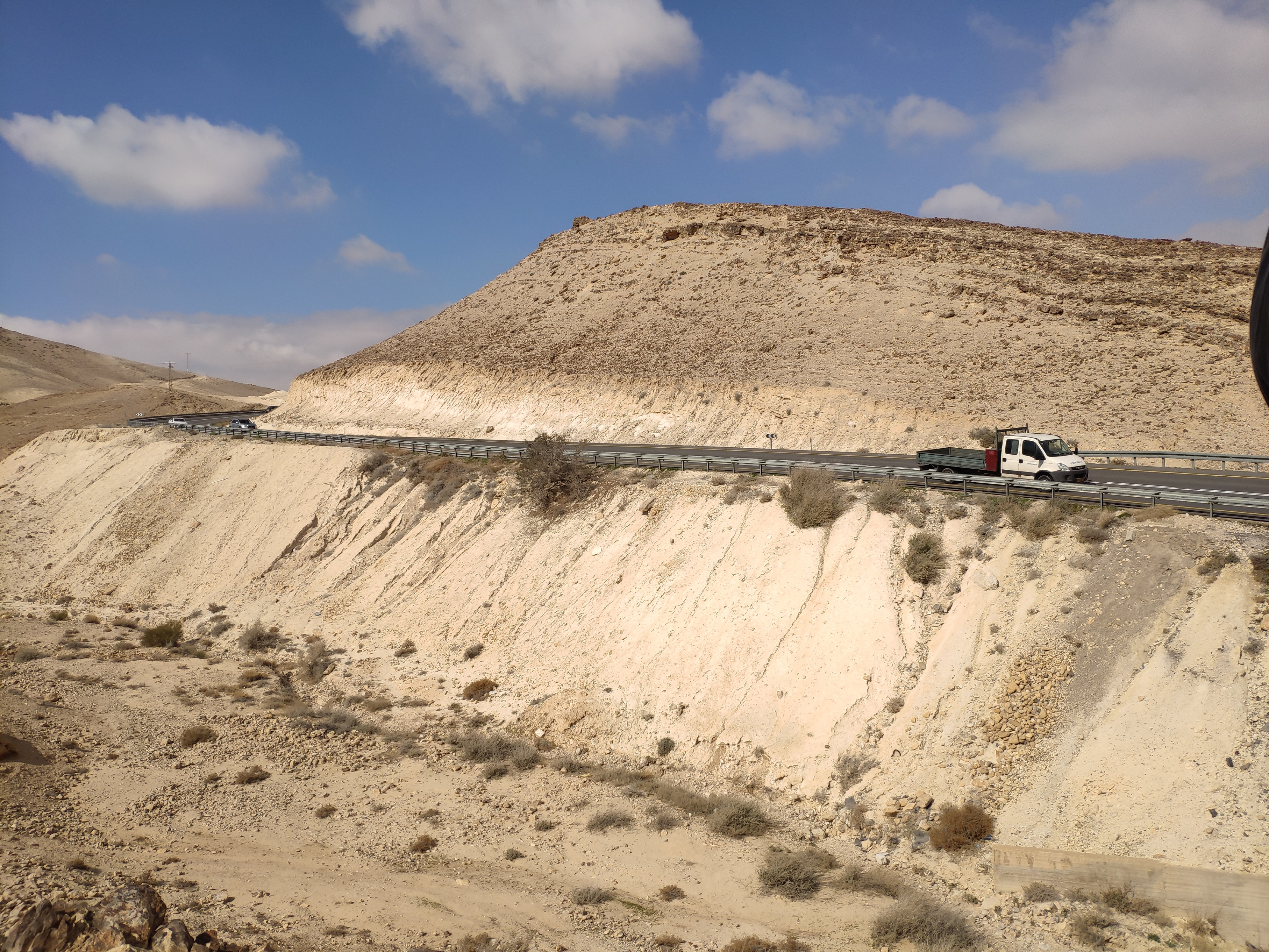 תצורת מישאש (צור, החלק הכהה למעלה) ותצורת מנוחה (קרטון, החלק הבהיר בתחתית התמונה), בכביש 31 מדרום-מזרח לערד